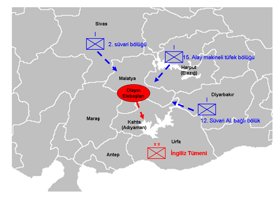 Haritanın aslı Wikipedia commons'dan alındı, çizim Ali Galip olayı maddesinde anlatılan hadisenin şeması ve ilgili maddede kullanılıyor.